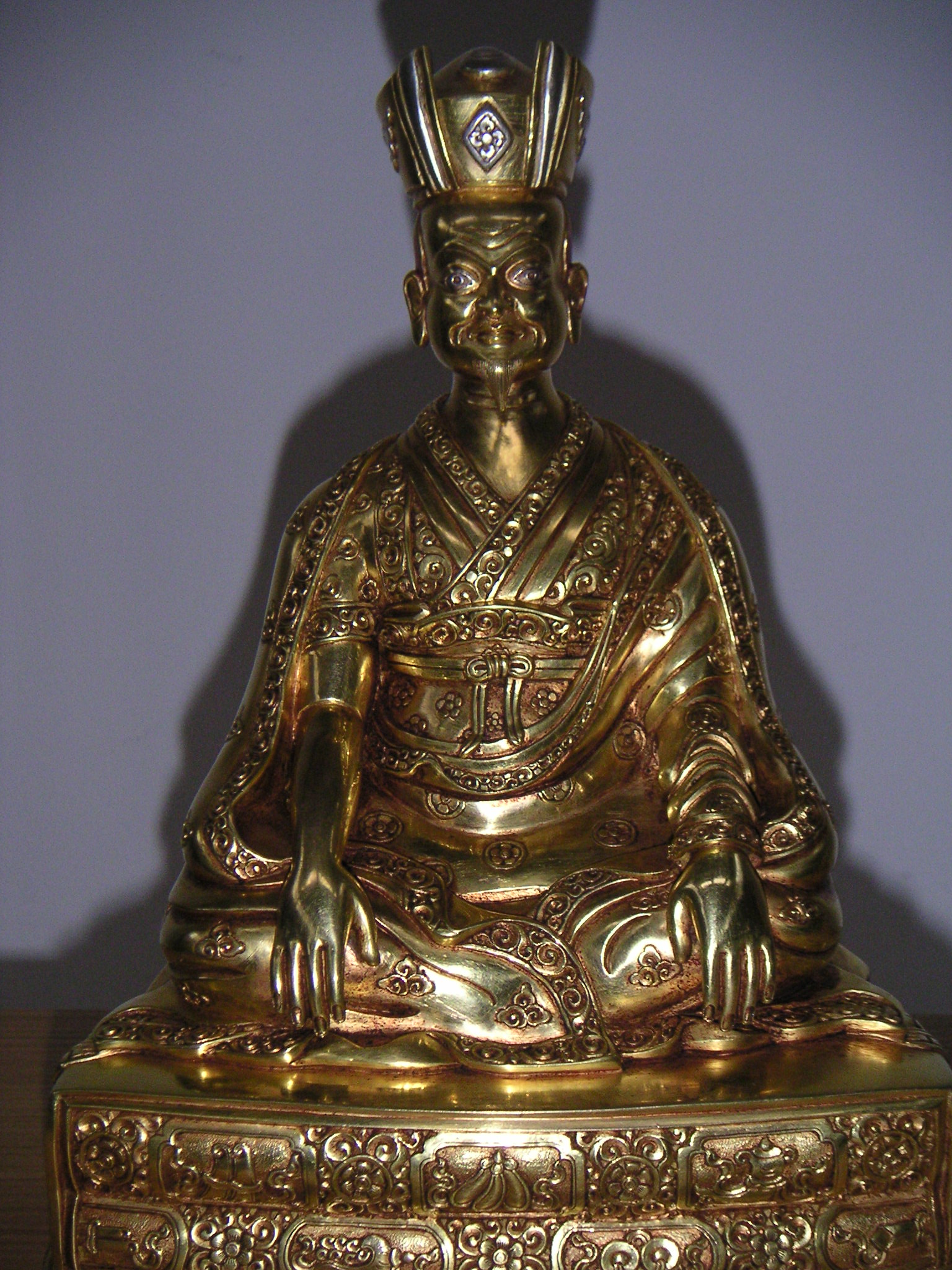 Karma Pakshi Statue. Von Benutzer Panchito selbst fotografiert. GNU-FDL frei